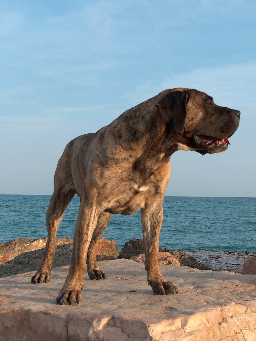 Dogo canario, bearbeitet